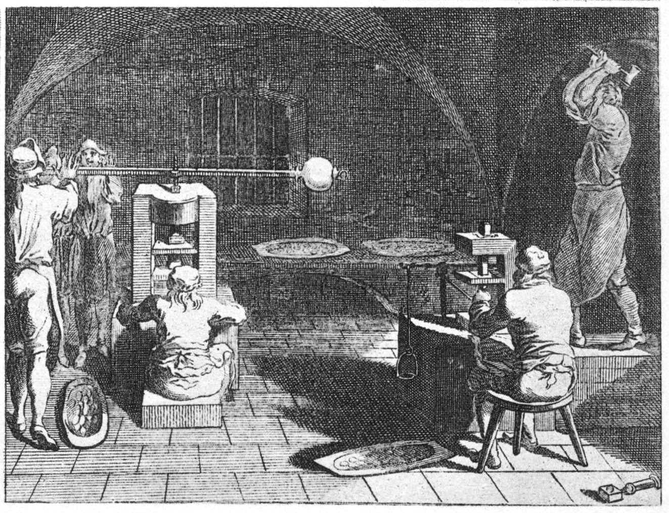 Tab. LVI. Handwerke und Künste. d) Der Münzer vor dem Klippwerk, an welchem, vermittelst eines Steigbügels, der Prägestempel kann aufgehoben werden, um jedesmal das geprägte Stück herauszunehmen. Auf der anderen Seite ein Stoßwerk, auf welchem, vermittelst der Balanzierstange, Münzen geprägt werden. (Beschreibung lt. Quelle)